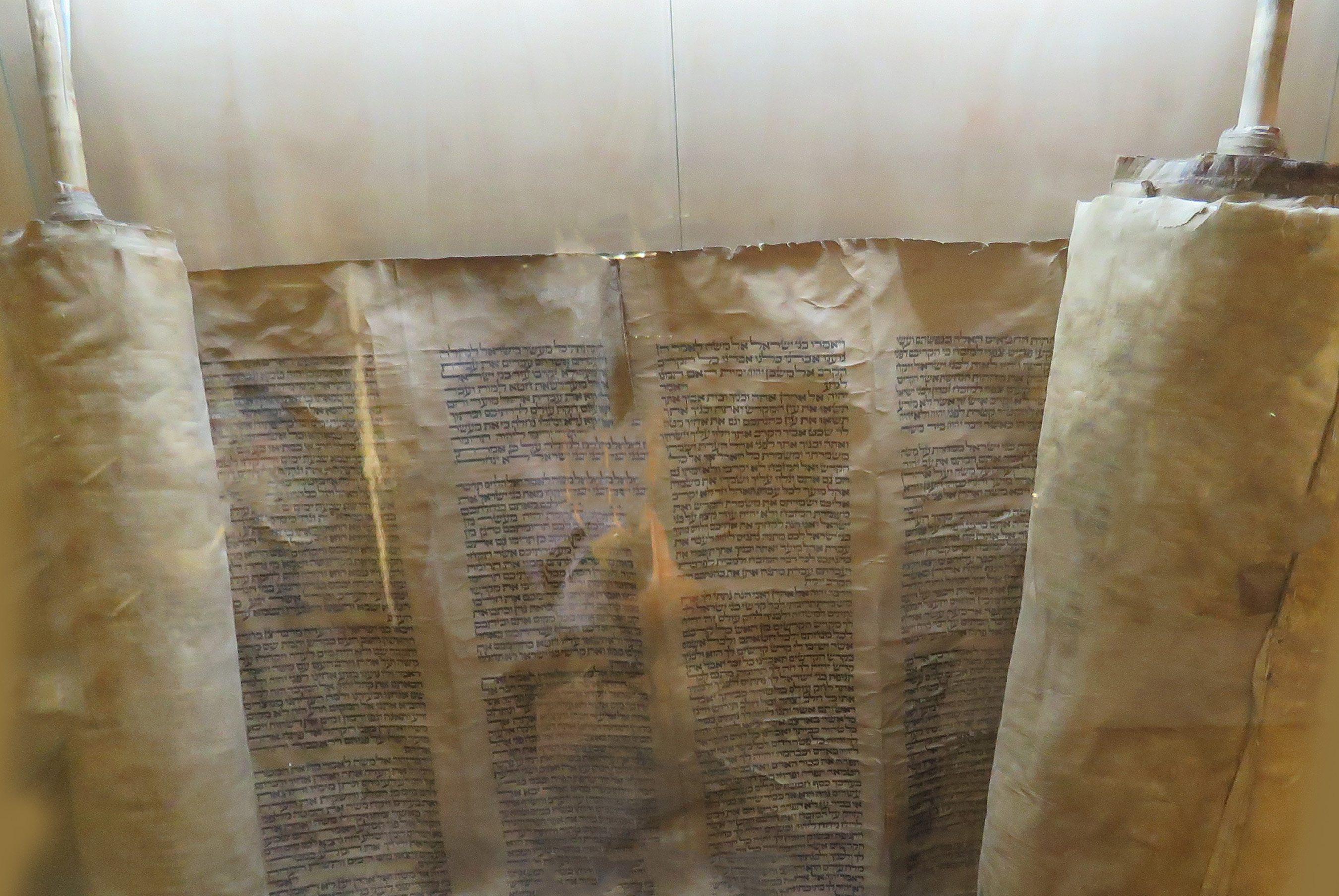 בתמונה ניתן לראות בספר תורה עתיק ששרד.